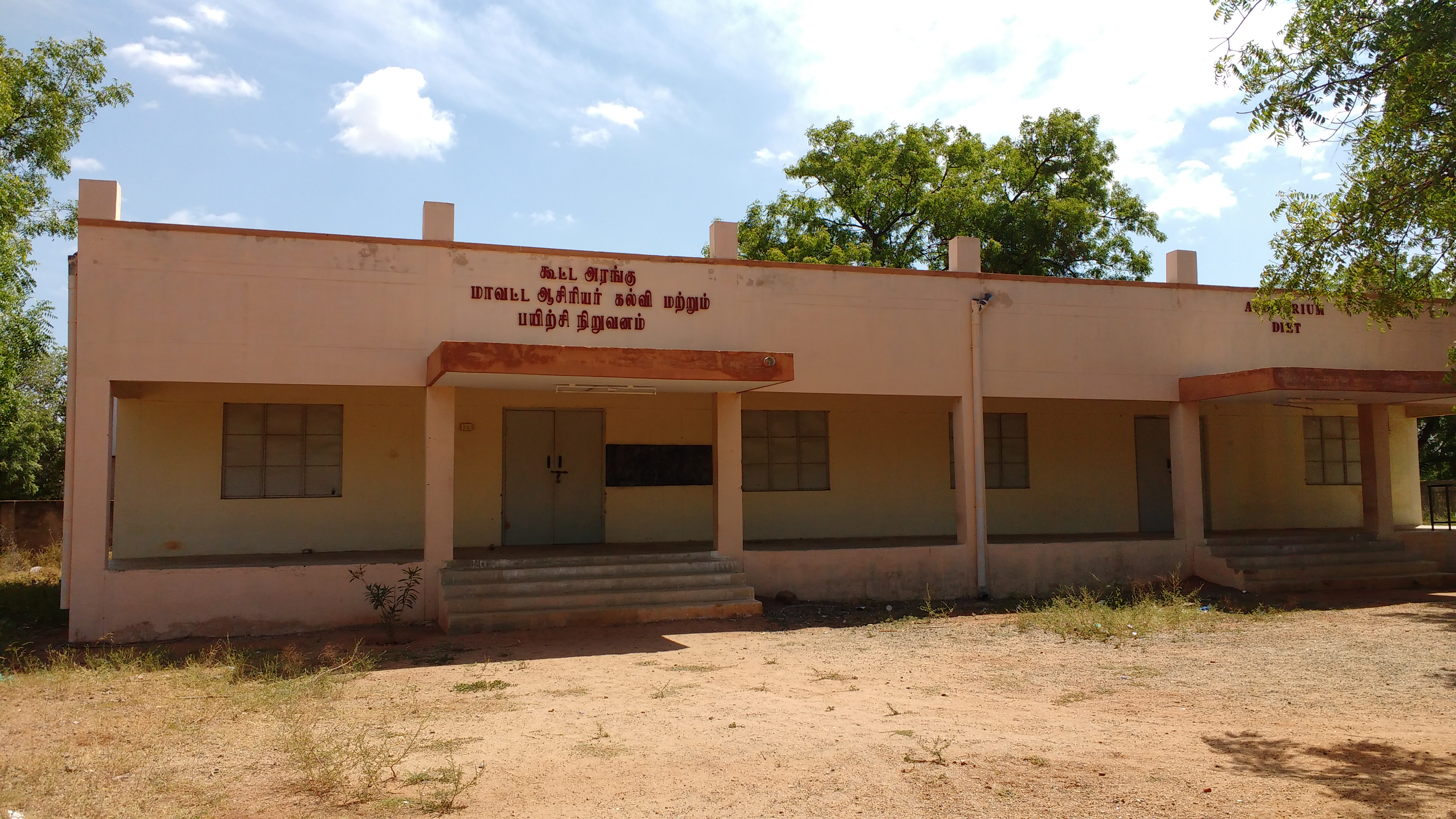 மாயனூர் மாவட்ட ஆசிரியர் கல்வி மற்றும் பயிற்சி நிறுவன கூட்ட அரங்கு